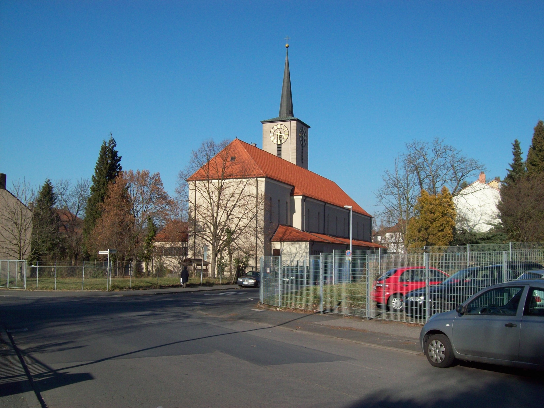 Katholische Pfarrkirche St. Josef Aschaffenburg (Chor und Kirchenschiff von 1953)